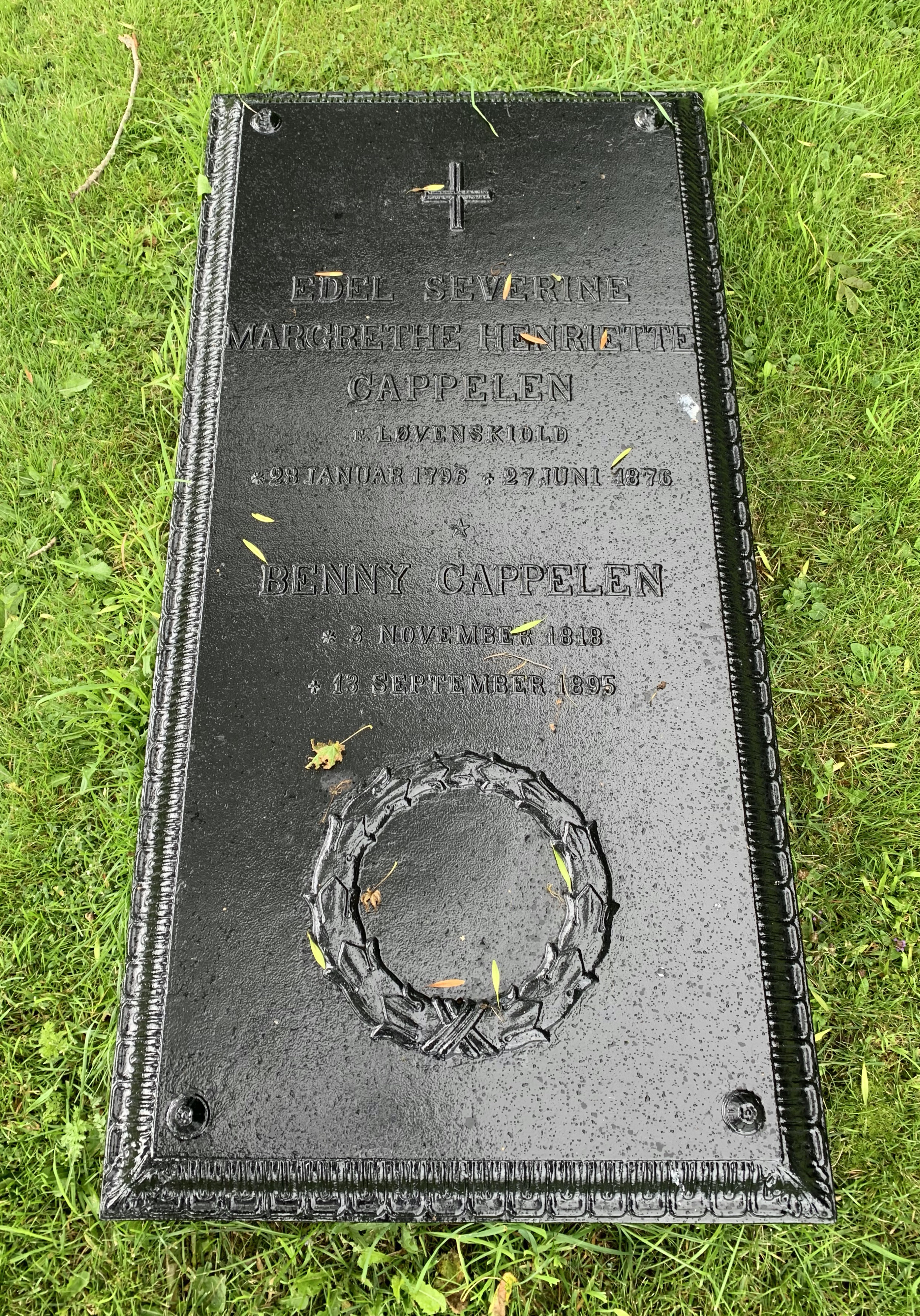 Gravminde over Edel Severine Margrethe Henriette Løvenskiold, gift Cappelen